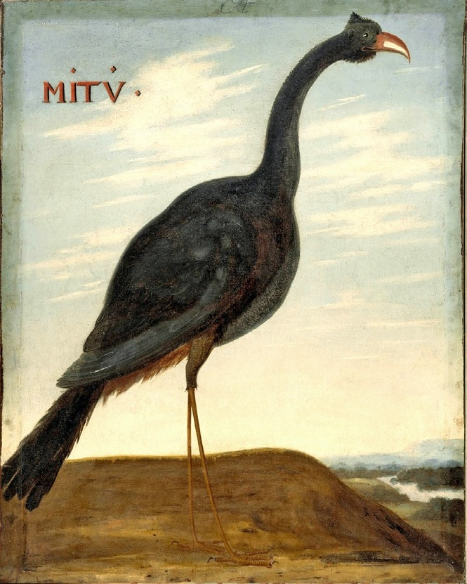 Hoflößnitz, Eckhout: Bild 54: Mitu